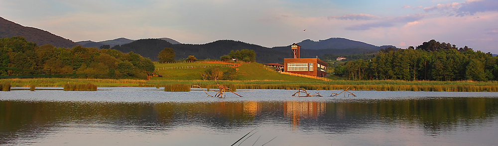 Panorámica de las marismas de Gautegiz Arteaga. En el centro, Urdaibai Bird Center.